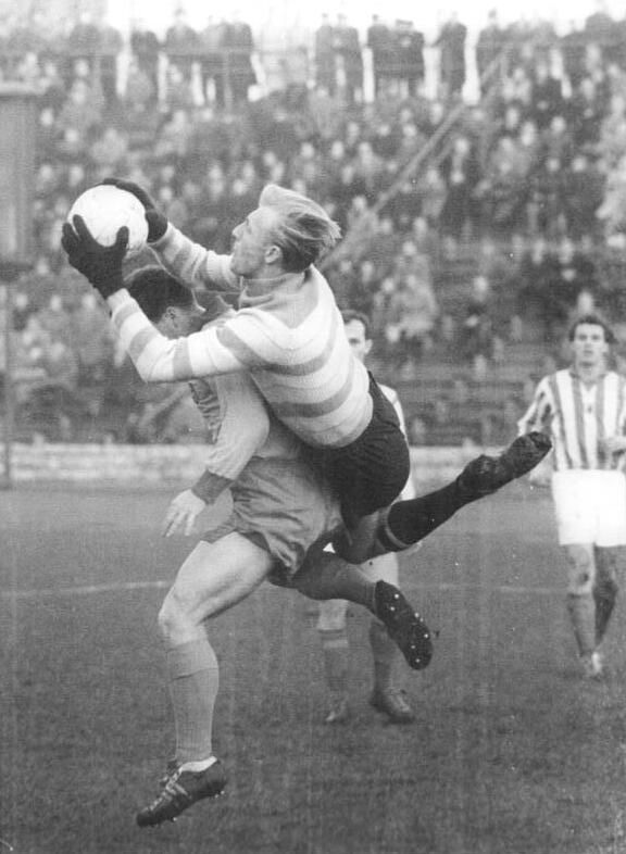 Zentralbild-Wendorf Wen-Noa 6.12.1958 Vorwärts verlor mit 3:1 Toren - Am 6.12.1958 musste der ASK Vorwärts im Jahn-Stadion seine erste Niederlage in dieser Saison auf eigenem Platz im Viertel-Finalspiel um den FDGB-Pokal gegen den SC Einheit Dresden hinnehmen. UBz: Torwart Großstück (SC Einheit) nimmt Vorwärts-Spieler Vogt (verdeckt) den Ball vom Kopf weg.